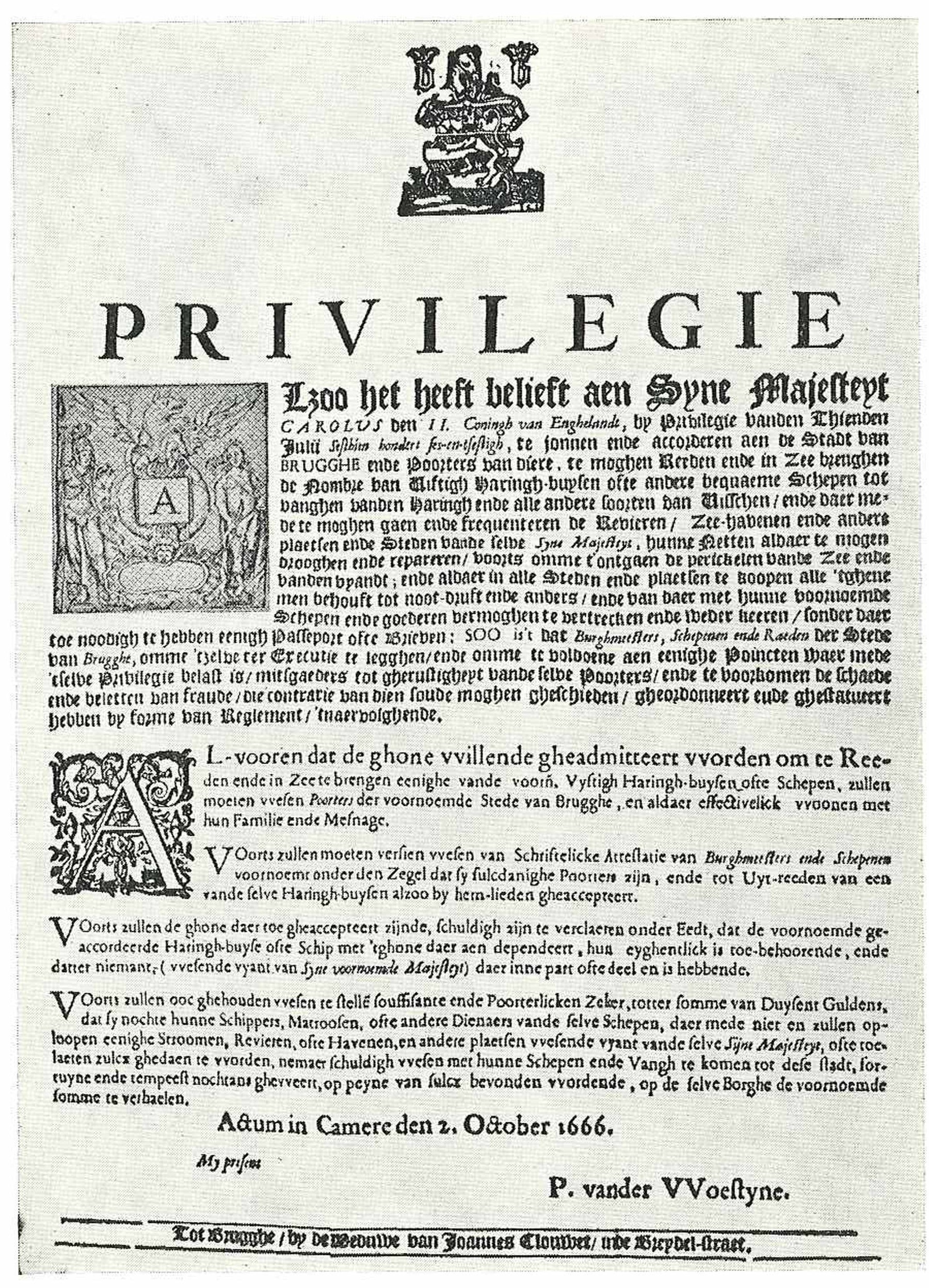 Aanplakking. Zie ook museumstuk.